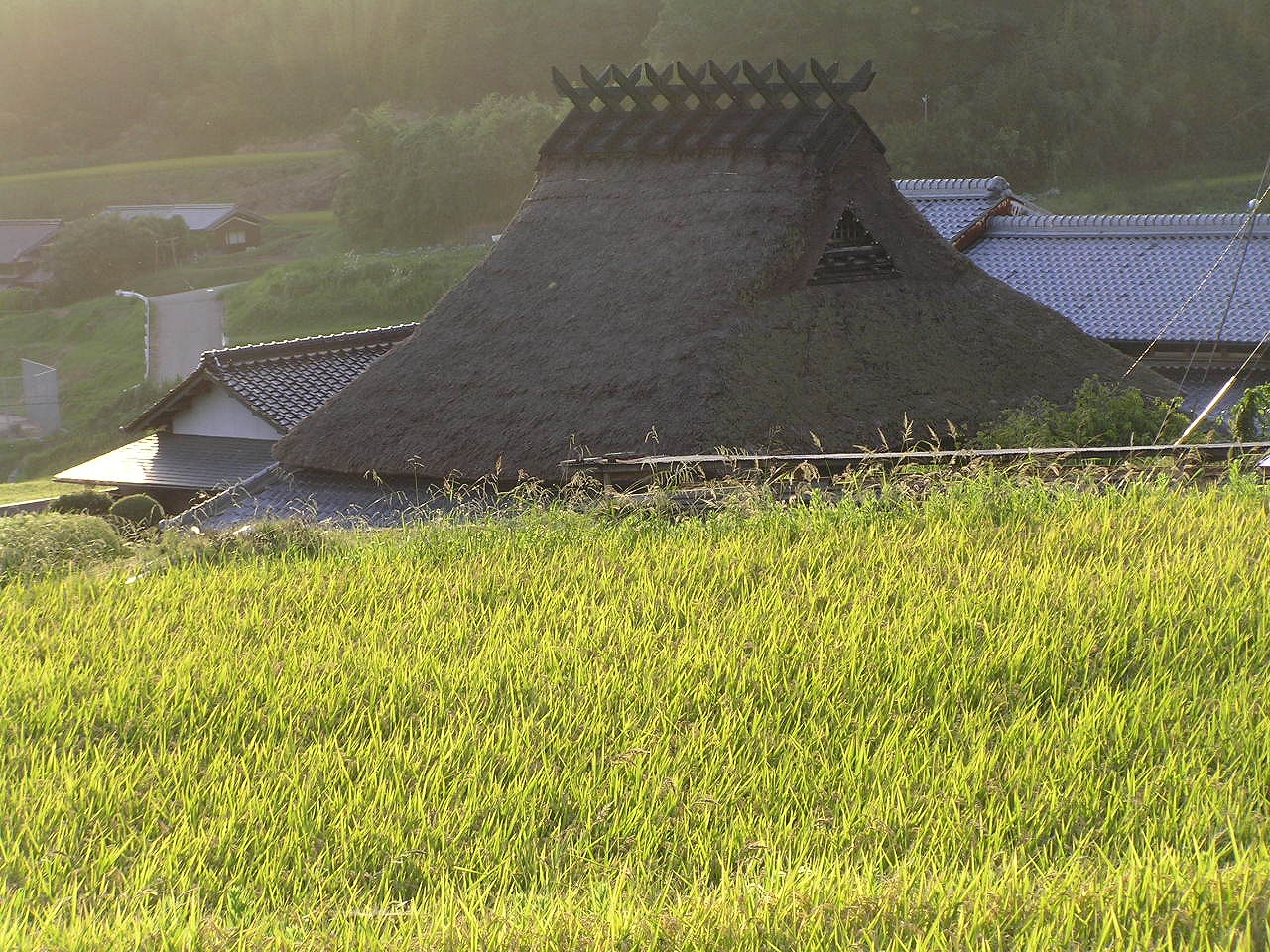 神戸市北区北僧尾の古民家